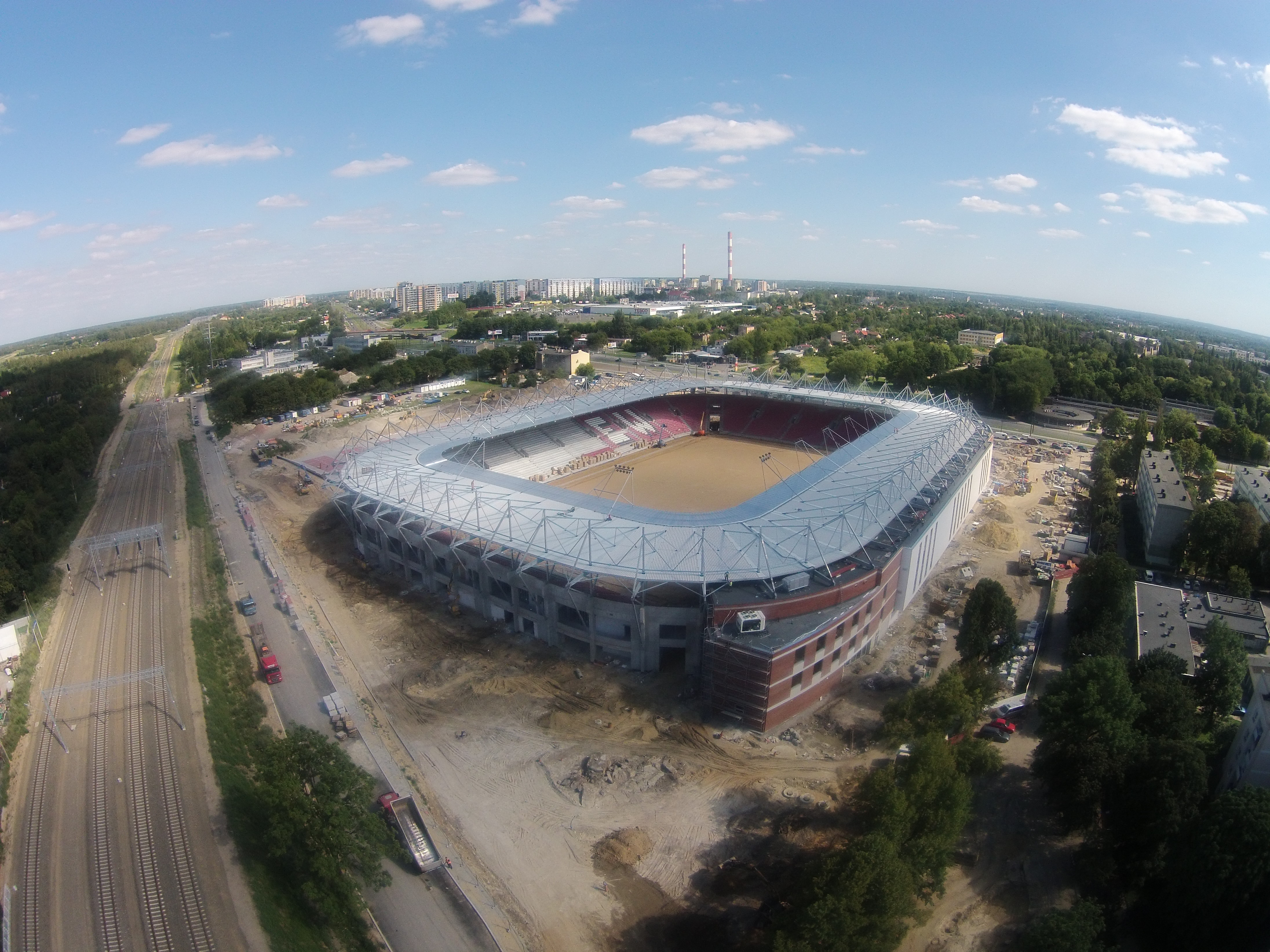 Budowa Stadionu Widzewa 22-07-2016